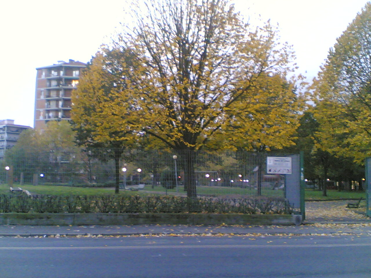 La Spezia, Liguria, Italy. Entrata del Parco XXV Aprile vista da via Prosperi